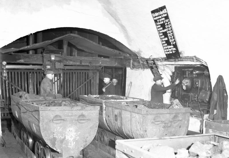 Richterschächte in Laurahütte, Ein und Ausfahrt für Kohlenzüge im Schacht